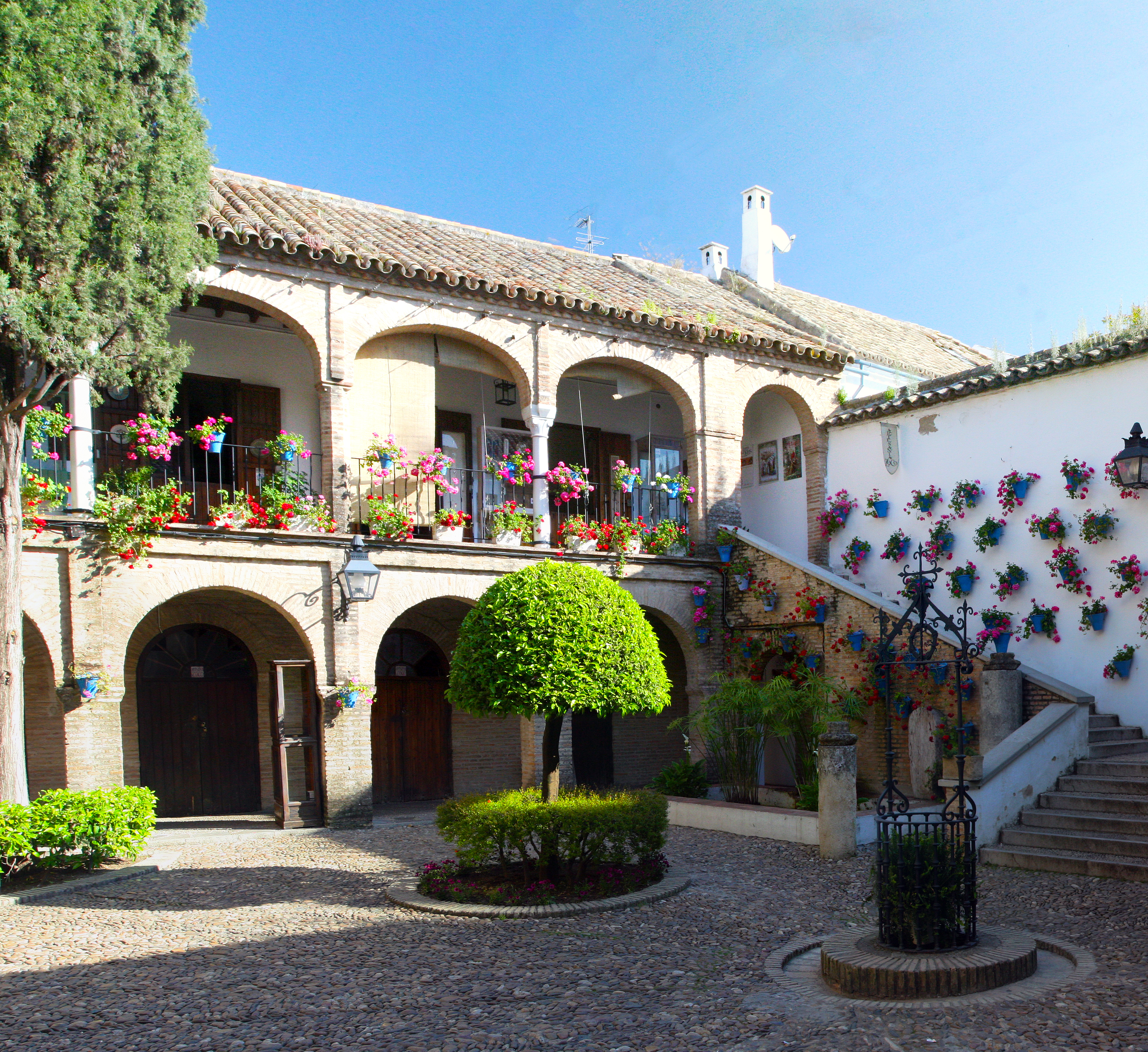 Córdoba (España).